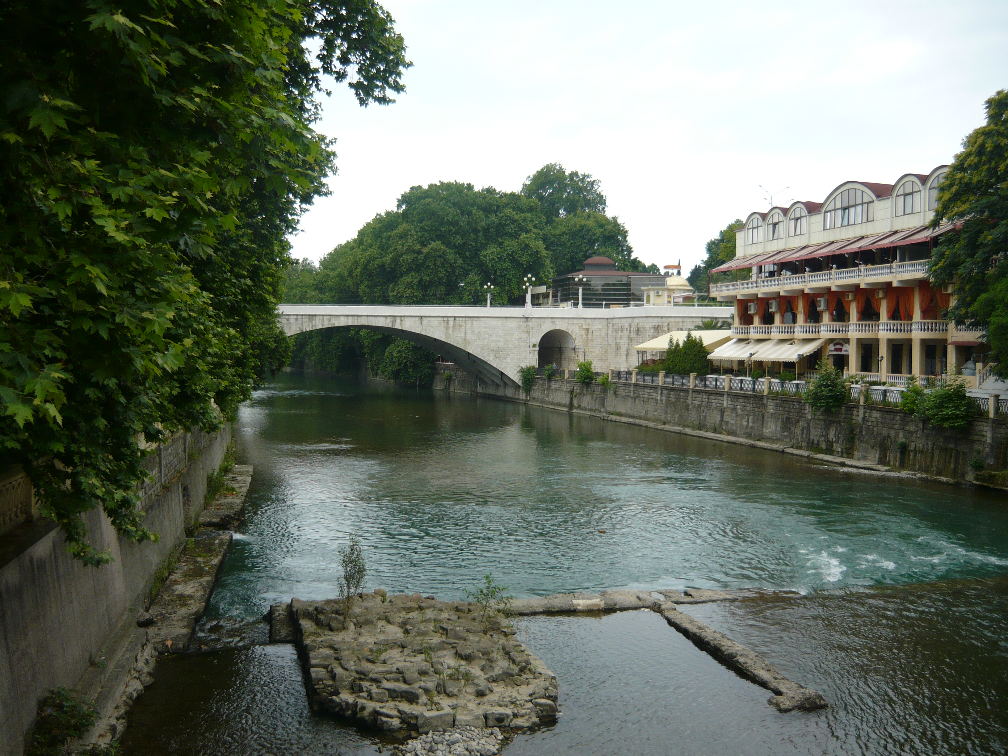 Ривьерский мост через р. Сочи. Является достопримечательностью г. Сочи